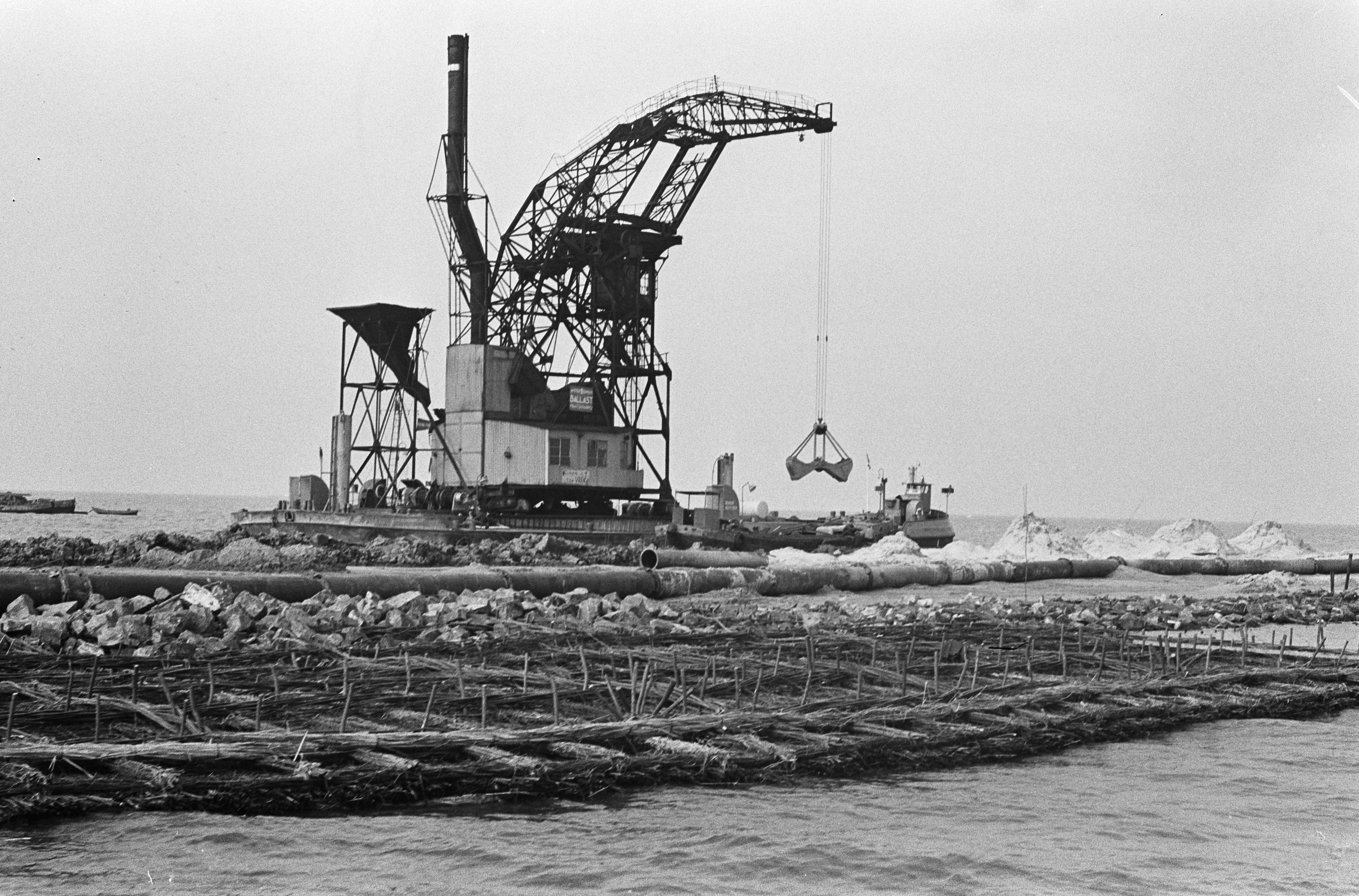 Collectie / Archief : Fotocollectie Anefo Reportage / Serie : [ onbekend ] Beschrijving : Drooglegging Zuidelijk Flevoland nabij Muiderberg. Op voorgrond de zinkstukken daarachter drijvende look Datum : 15 oktober 1963 Locatie : Flevoland, Muiderberg Trefwoorden : DROOGLEGGINGEN, ZINKSTUKKEN Fotograaf : Gelderen, Hugo van / Anefo Auteursrechthebbende : Nationaal Archief Materiaalsoort : Negatief (zwart/wit) Nummer archiefinventaris : bekijk toegang 2.24.01.05 Bestanddeelnummer : 915-6361